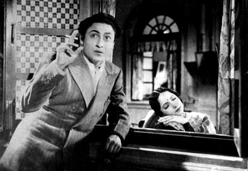 Mumtaz Shanti et Ashok Kumar dans la chanson Dheere Dheere - Kismet (1943)